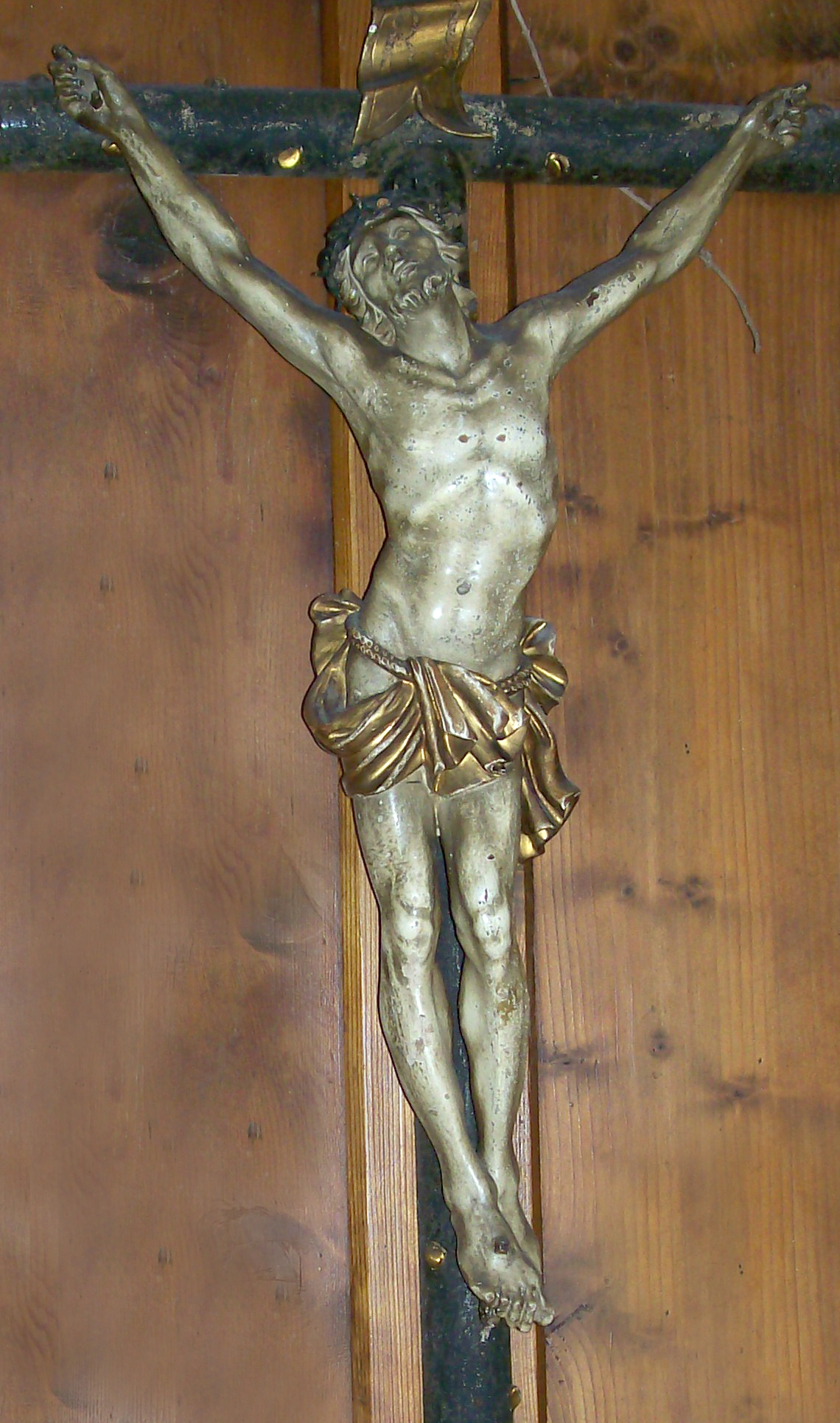 Crucifix by Franz Grünwald da Nudrei from St. Ulrich in Gröden - Ortisei Val Gardena